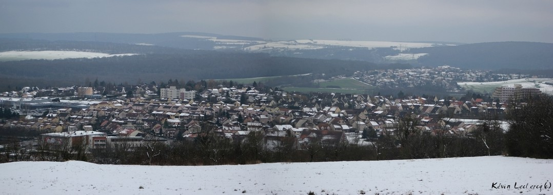 Photos plateau lorrain a Ludres (54)